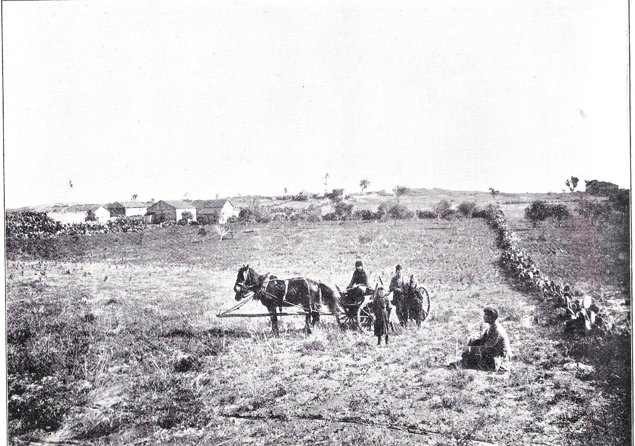 Jehudia